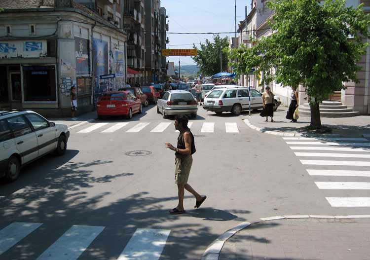 Раскрсница улице Светог Саве и Српског устанка. Поглед према југу, према аутобуској станици.